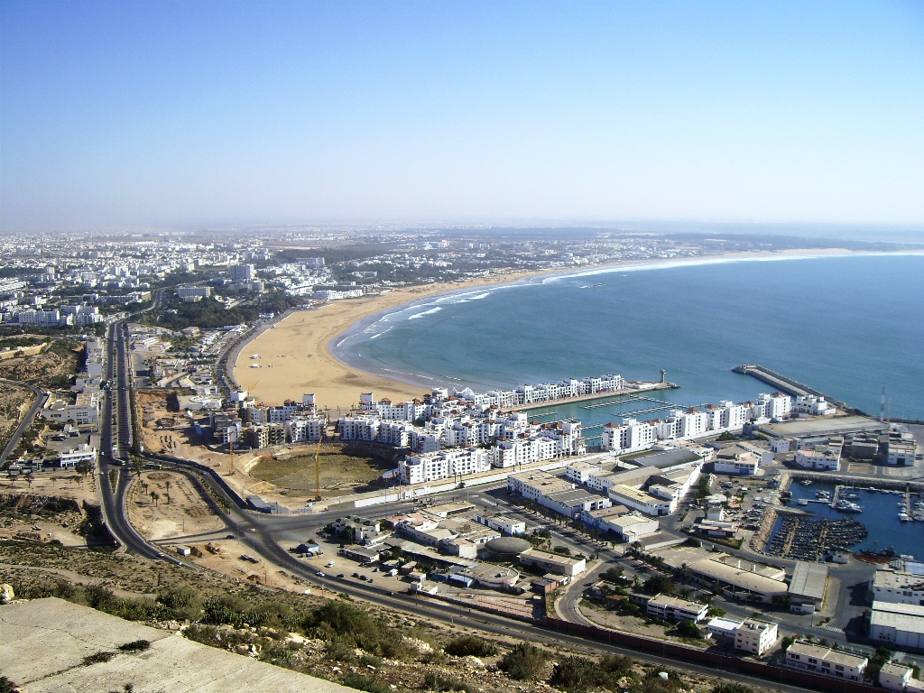 Agadir, Morocco